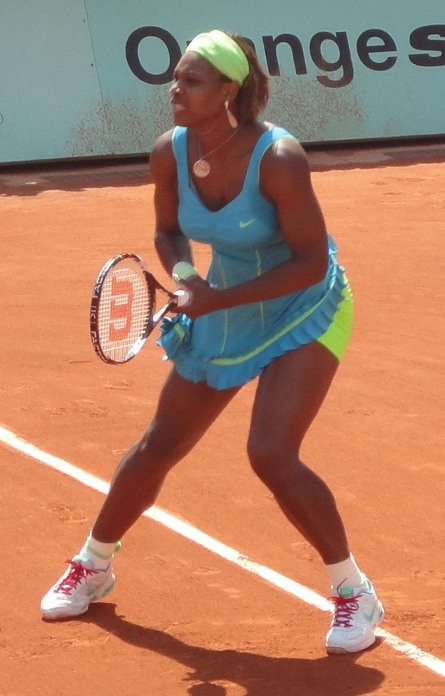 Serena Williams lors de Roland-Garros en 2010